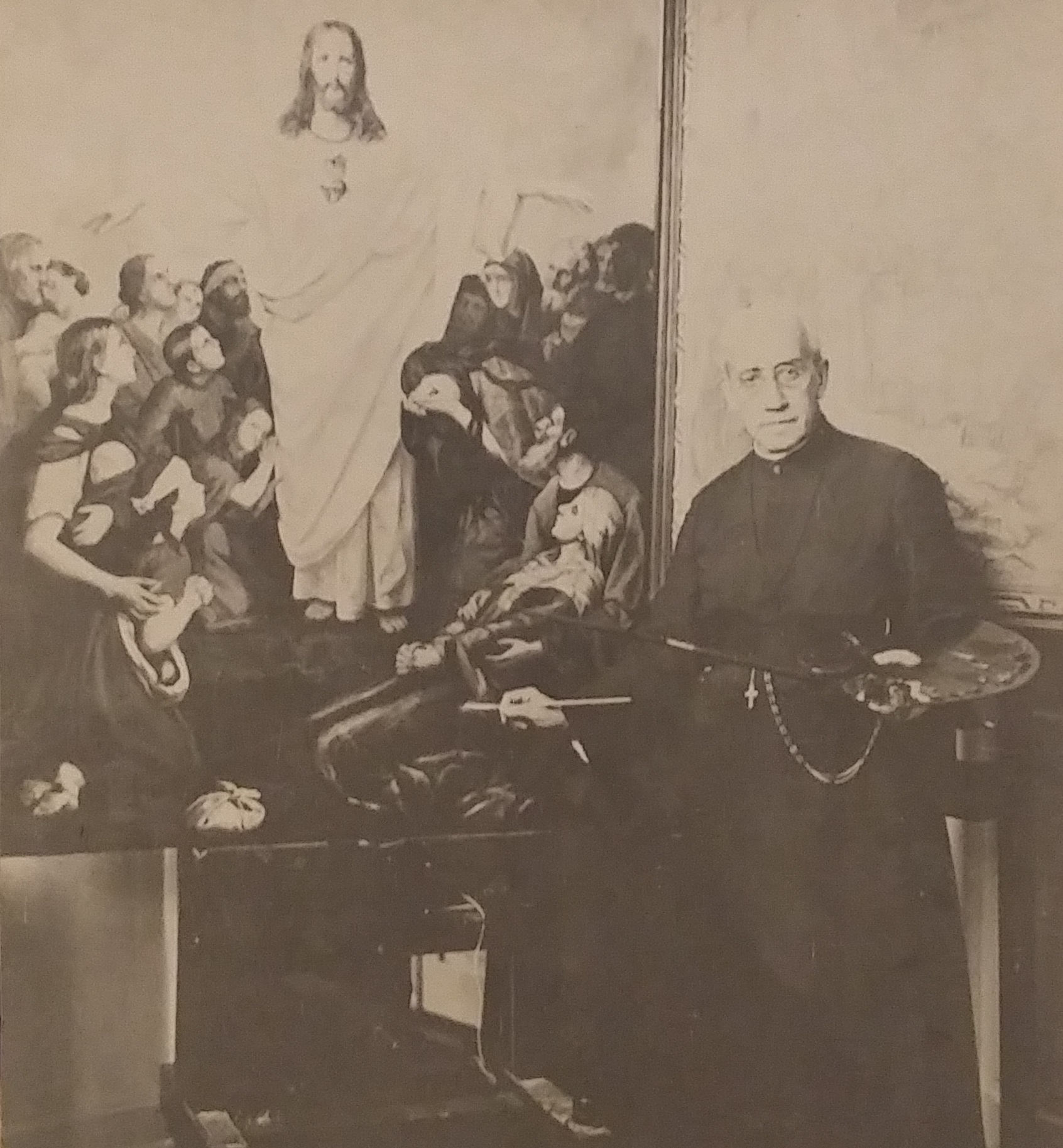 Retrato del pintor Gonzalo Carrasco